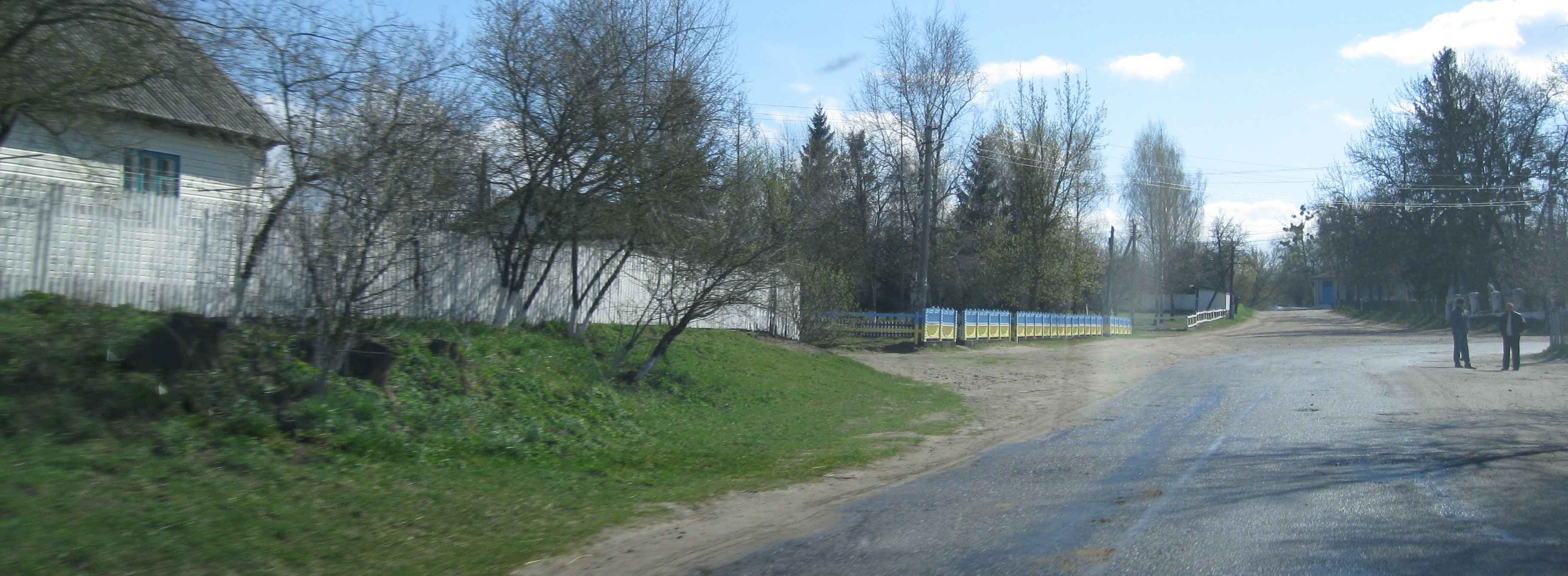 Село М'якоти